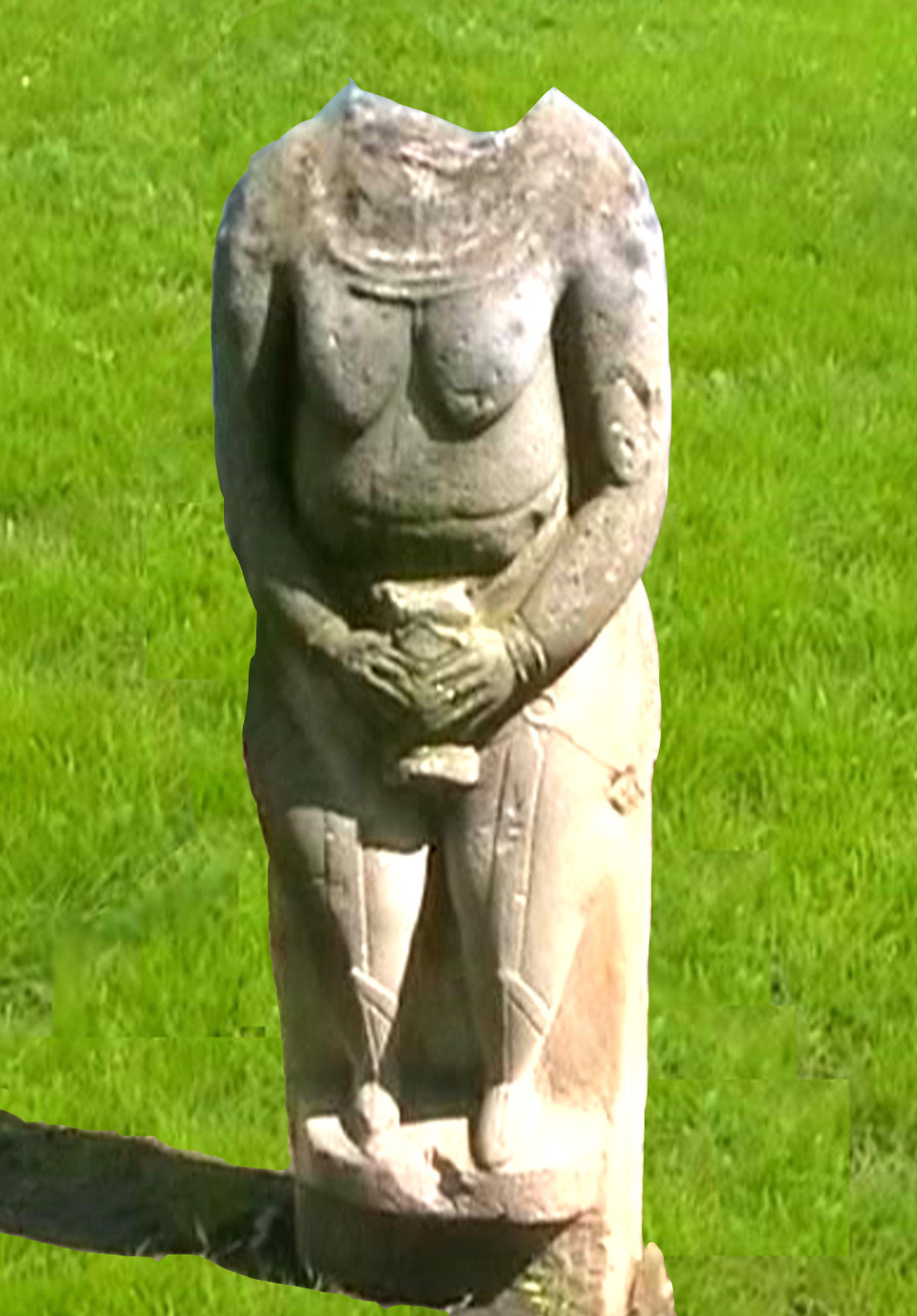 Kipchak stone baba